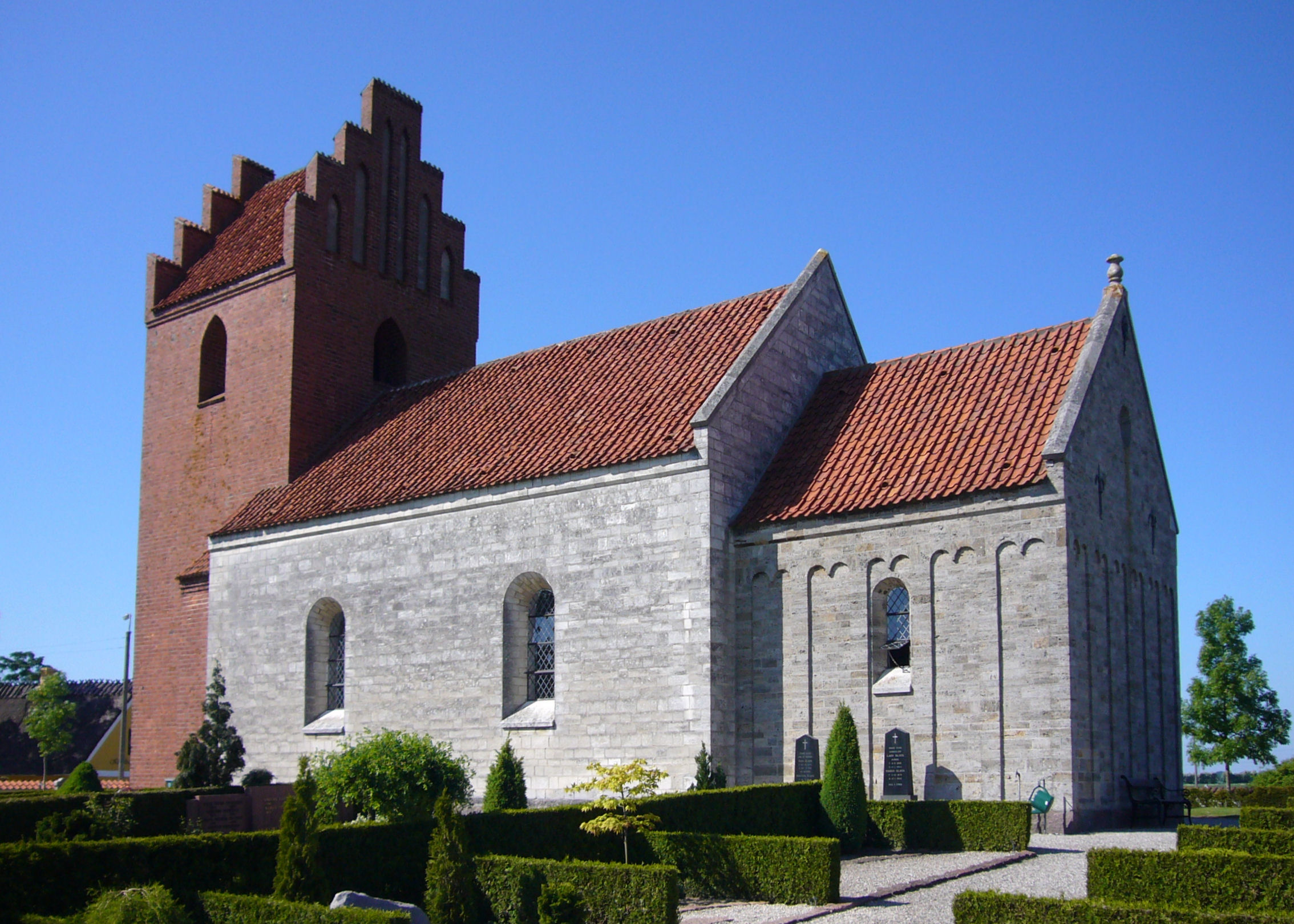 Kildebrønde Kirke, Roskilde County, Denmark.